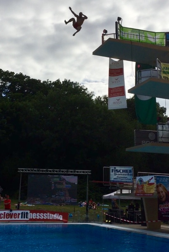 Turmspringen in Halle (Saale)